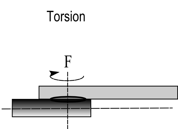 Prüfung von Kleinteilschweißverbindungen: Torsionsprüfung